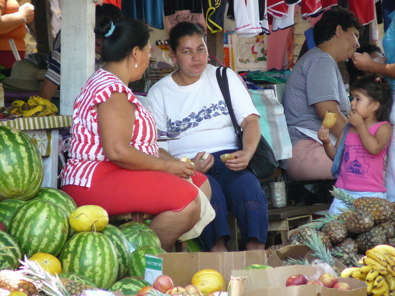 Fotos tomadas por mí, a inicios del año 2008 mercado de frutas en paraguari - 2 vendedoras conversando